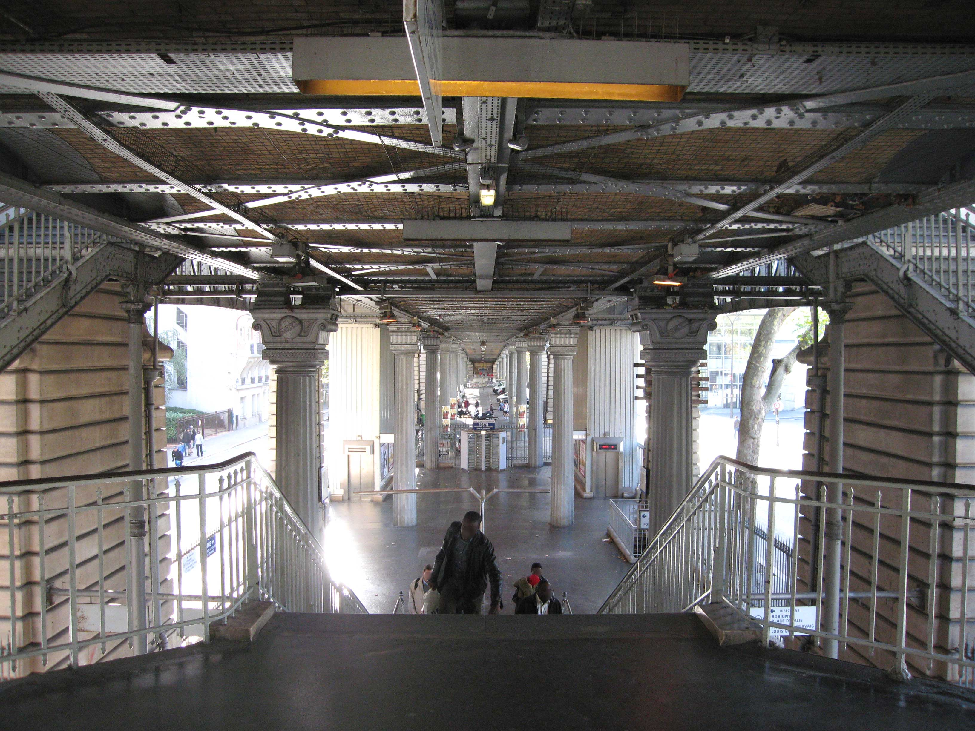 Métro de Paris, Sous le viaduc, Station Jaurès (ligne 2), Paris, France